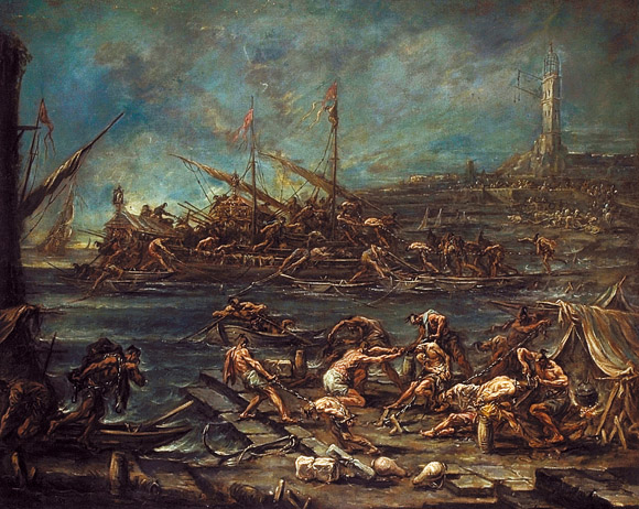 Bordeaux Musée des Beaux Arts.